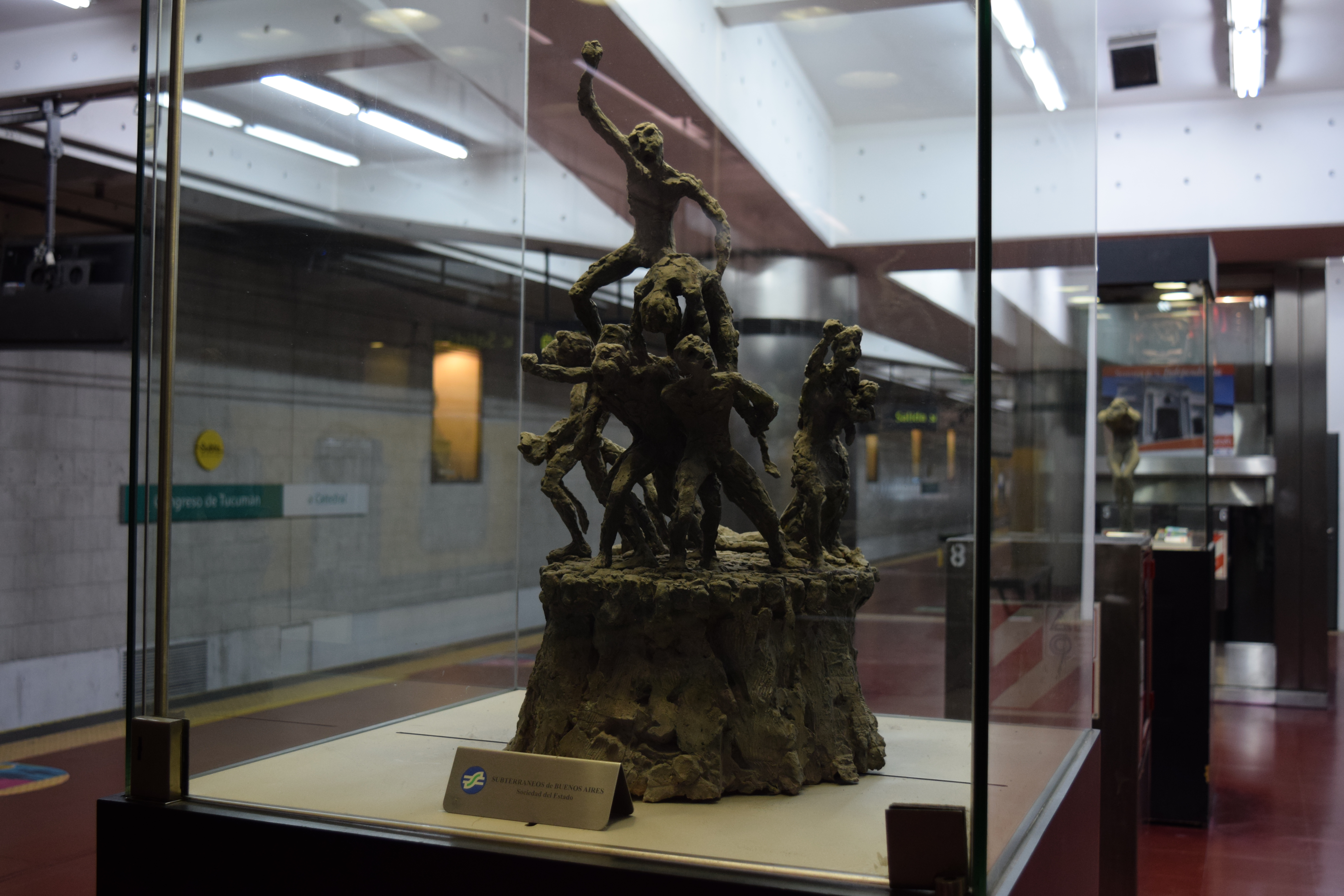 Exposición permanente de la estación.